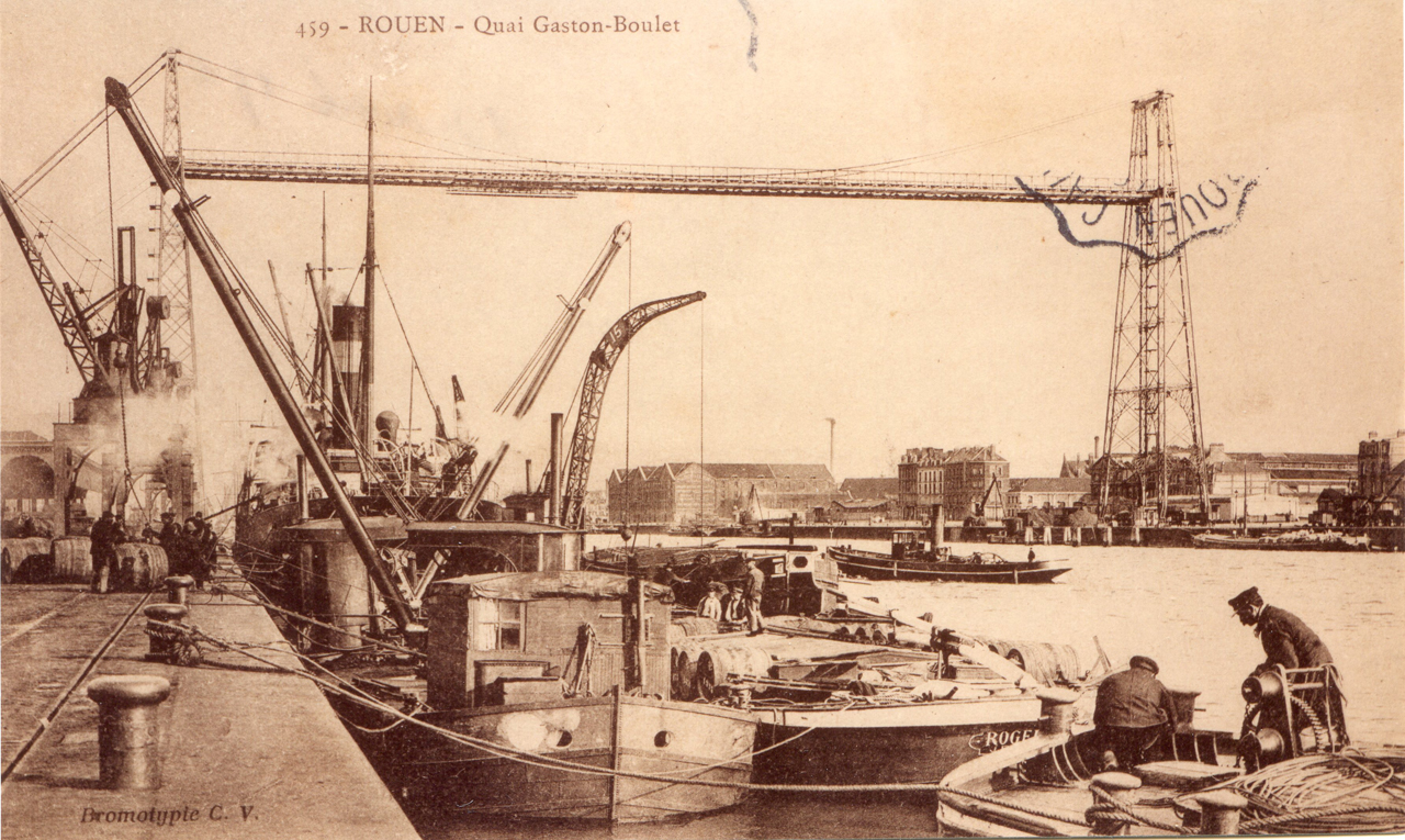 Pont transbordeur de Rouen, carte postale n°459 - Quai Gaston-Boulet. Bromotypte C. V.